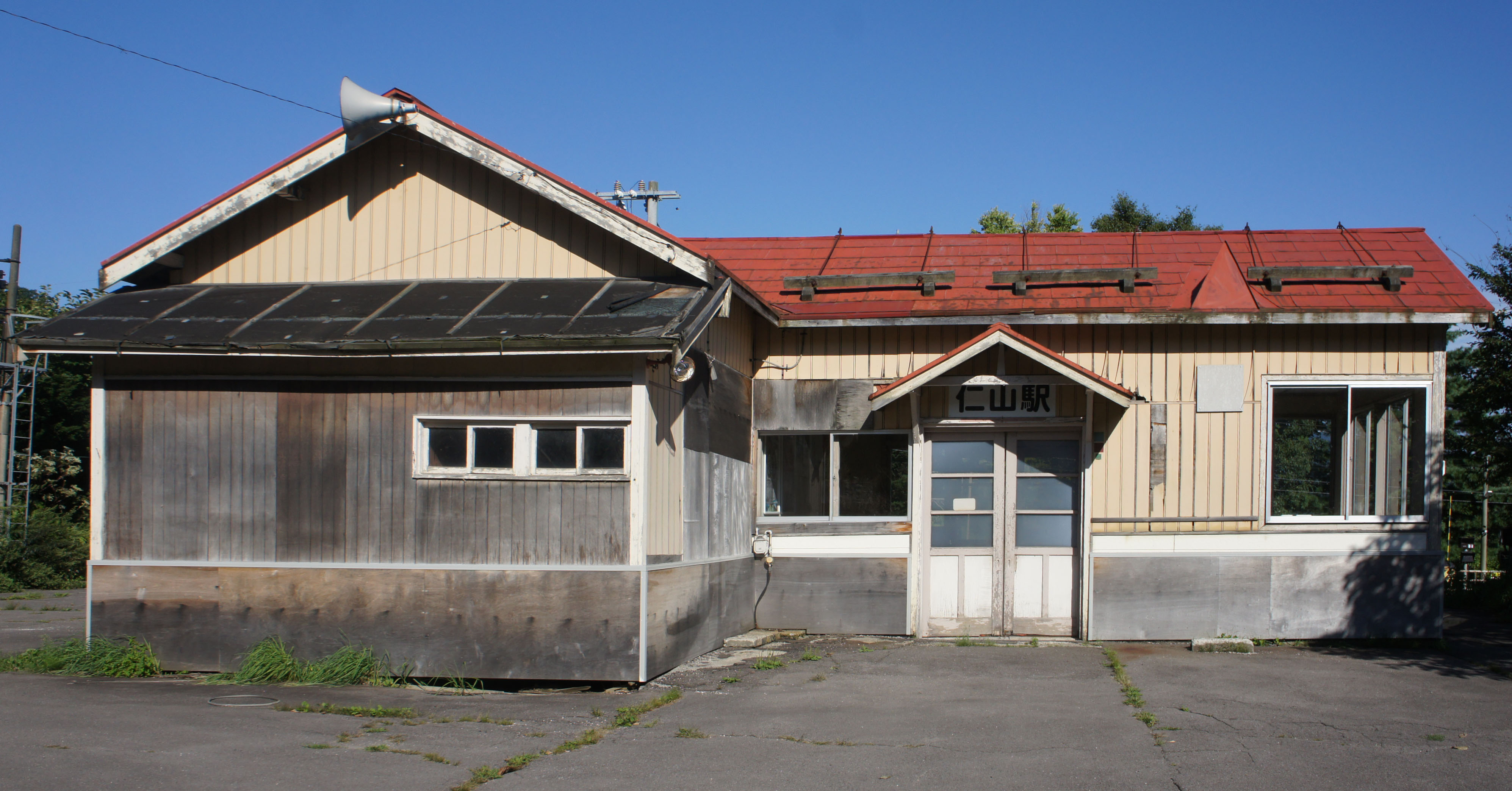 JR函館本線・仁山駅の駅舎 Sony NEX-3